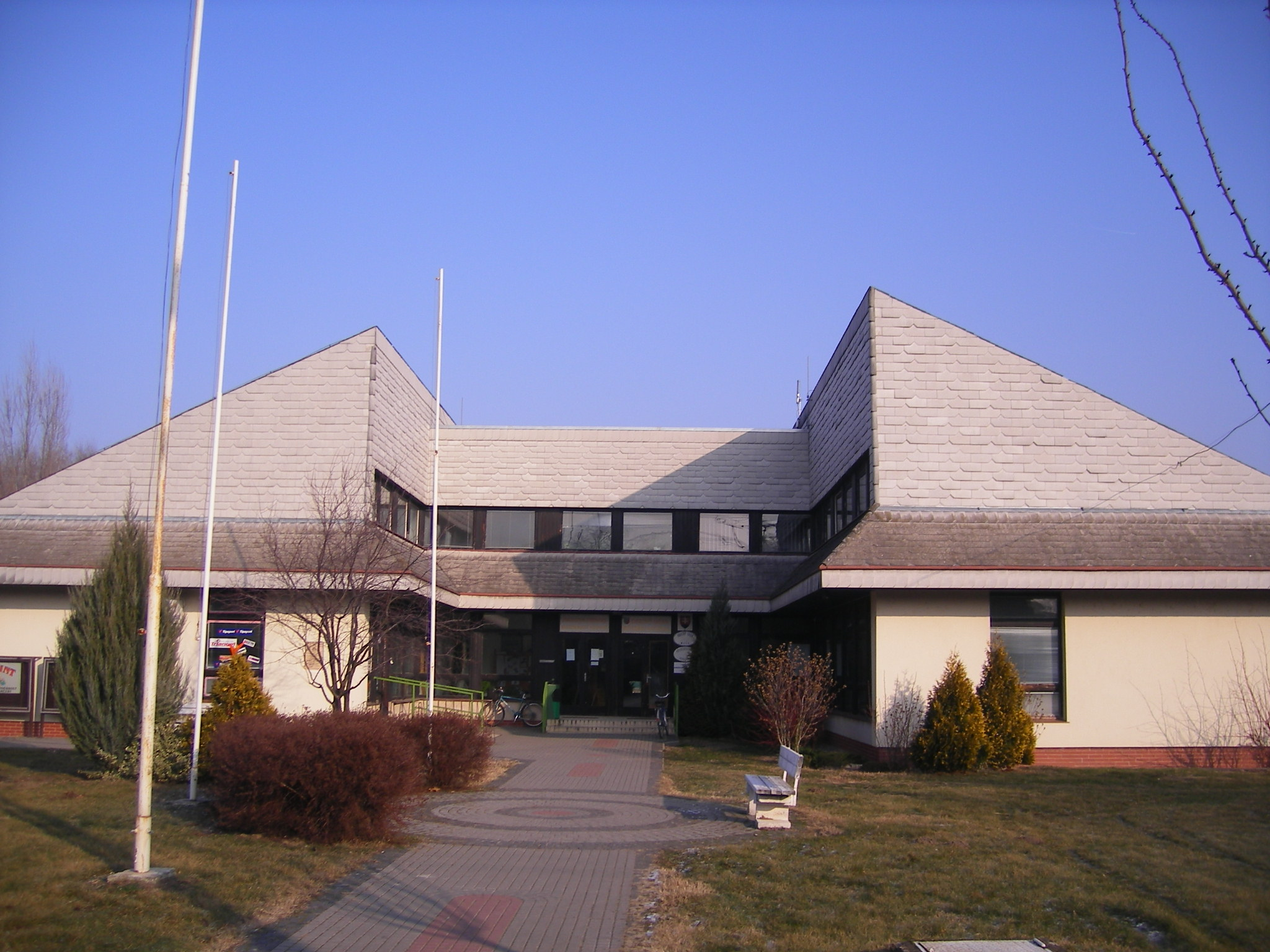 Dunamocs - községháza